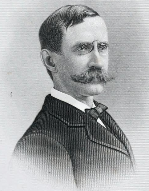 Portrait of S.G.W. Benjamin (Samuel Greene Wheeler Benjamin)